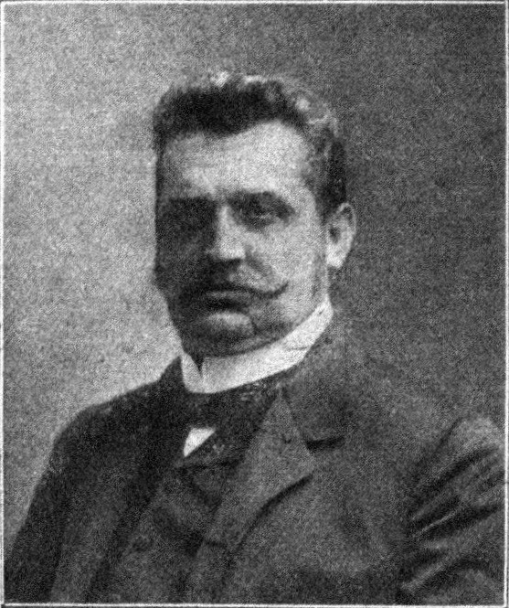 Österreichischer Politiker, Reichsratswahl 1907, Name siehe Dateiname